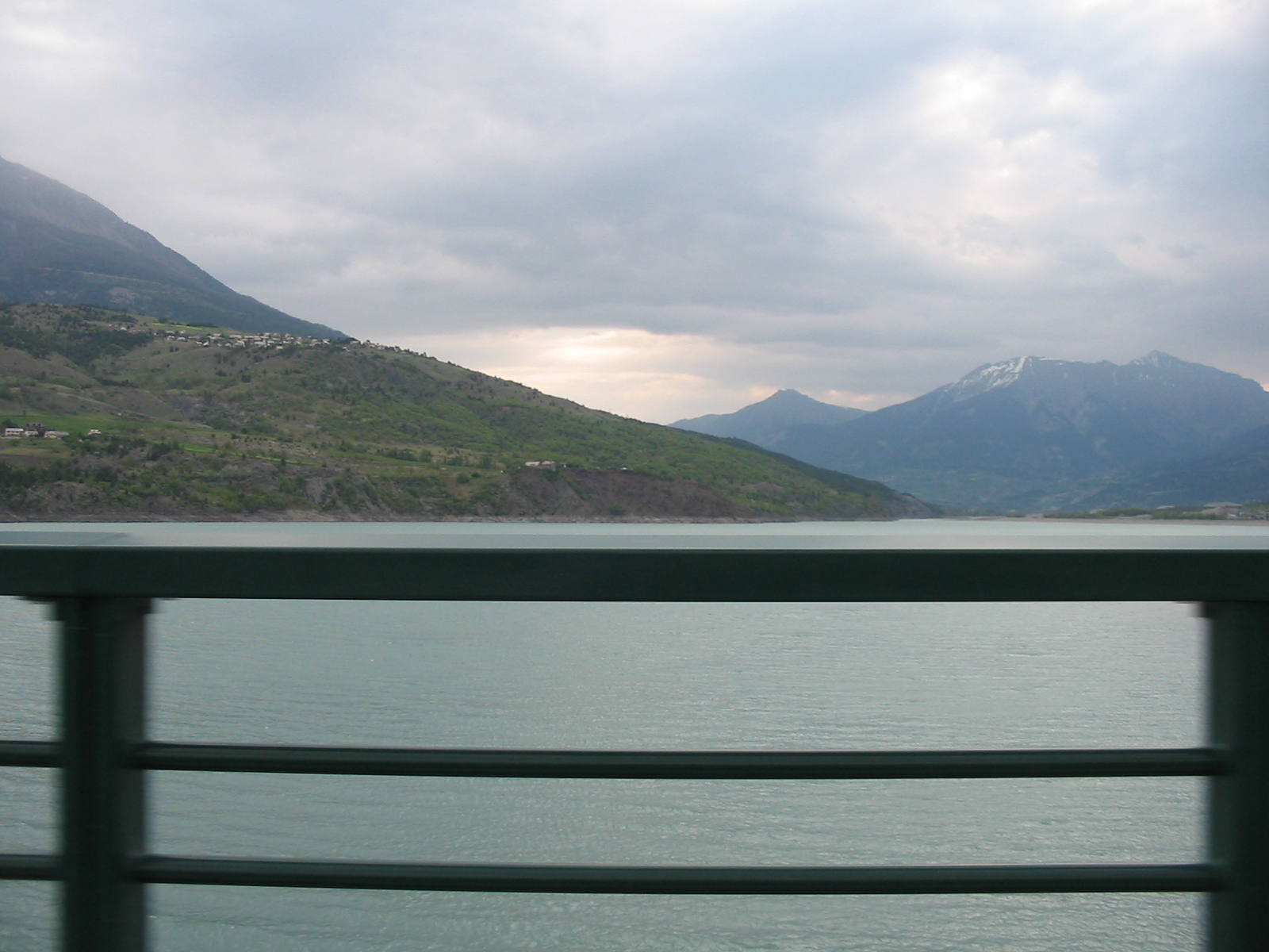 Le lac de Serre-Ponçon (05). Vue depuis le pont de Savines. Je suis l'auteur du cliché pris en avril 2007